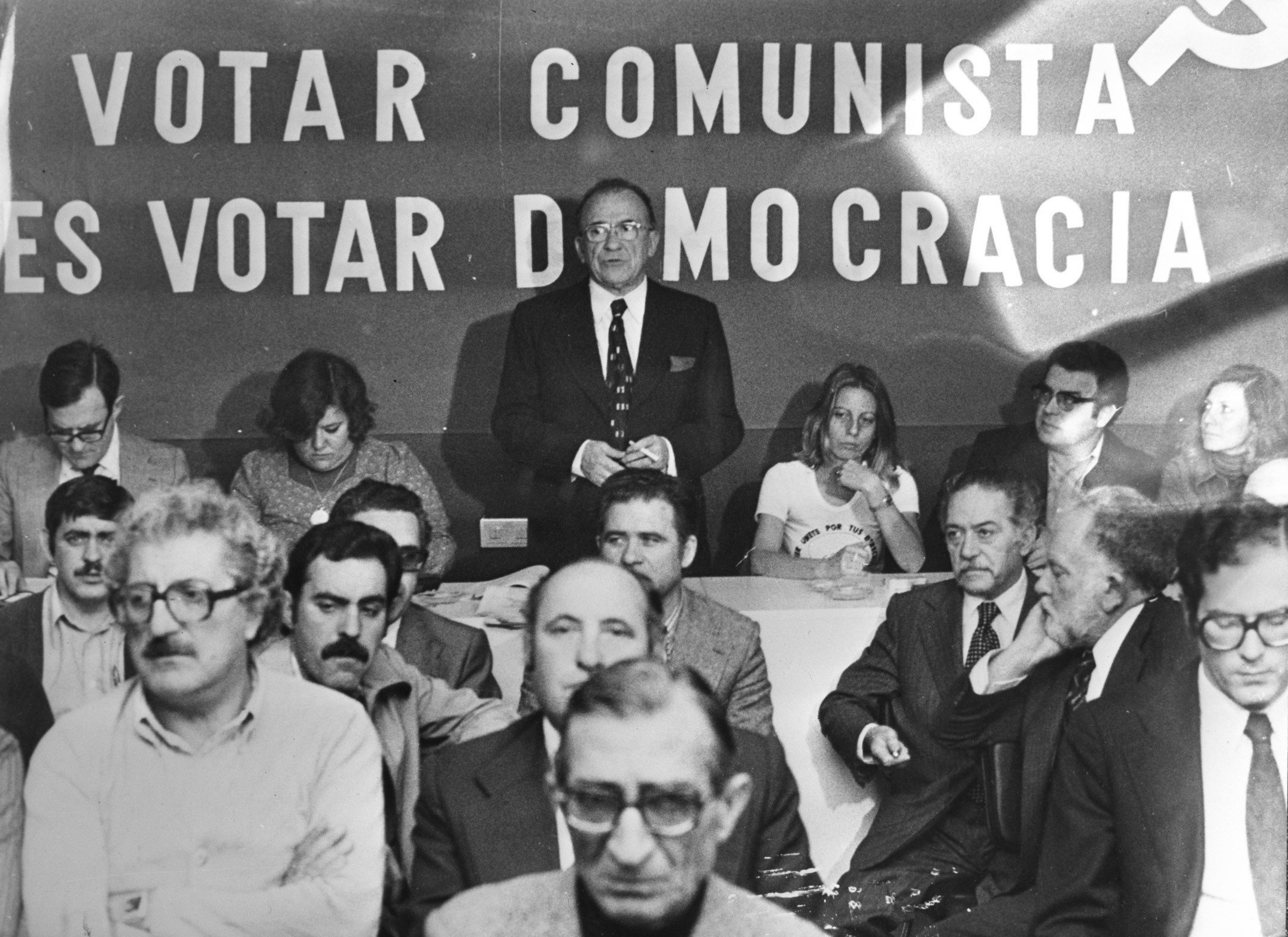 Collectie / Archief : Fotocollectie Anefo Reportage / Serie : [ onbekend ] Beschrijving : Spaanse verkiezingen; Santiago Carrillo (PCE) presenteert kandidaten voor zijn partij links Ramon Tamames en Christina Almeida , rechts Pilar Brabo Datum : 13 juni 1977 Locatie : Spanje Trefwoorden : kandidaten, politieke partijen, verkiezingen Fotograaf : [onbekend] Auteursrechthebbende : Nationaal Archief Materiaalsoort : Negatief (zwart/wit) Nummer archiefinventaris : bekijk toegang 2.24.01.04 Bestanddeelnummer : 929-2263